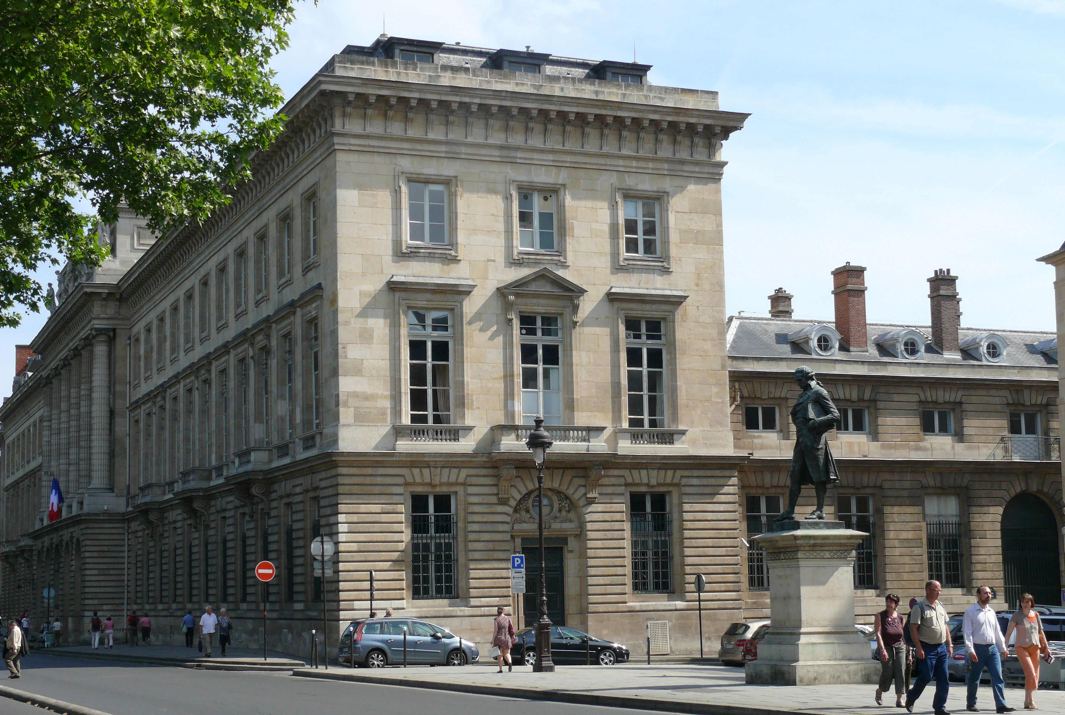 Paris 6ème arrondissement - La Monnaie de Paris